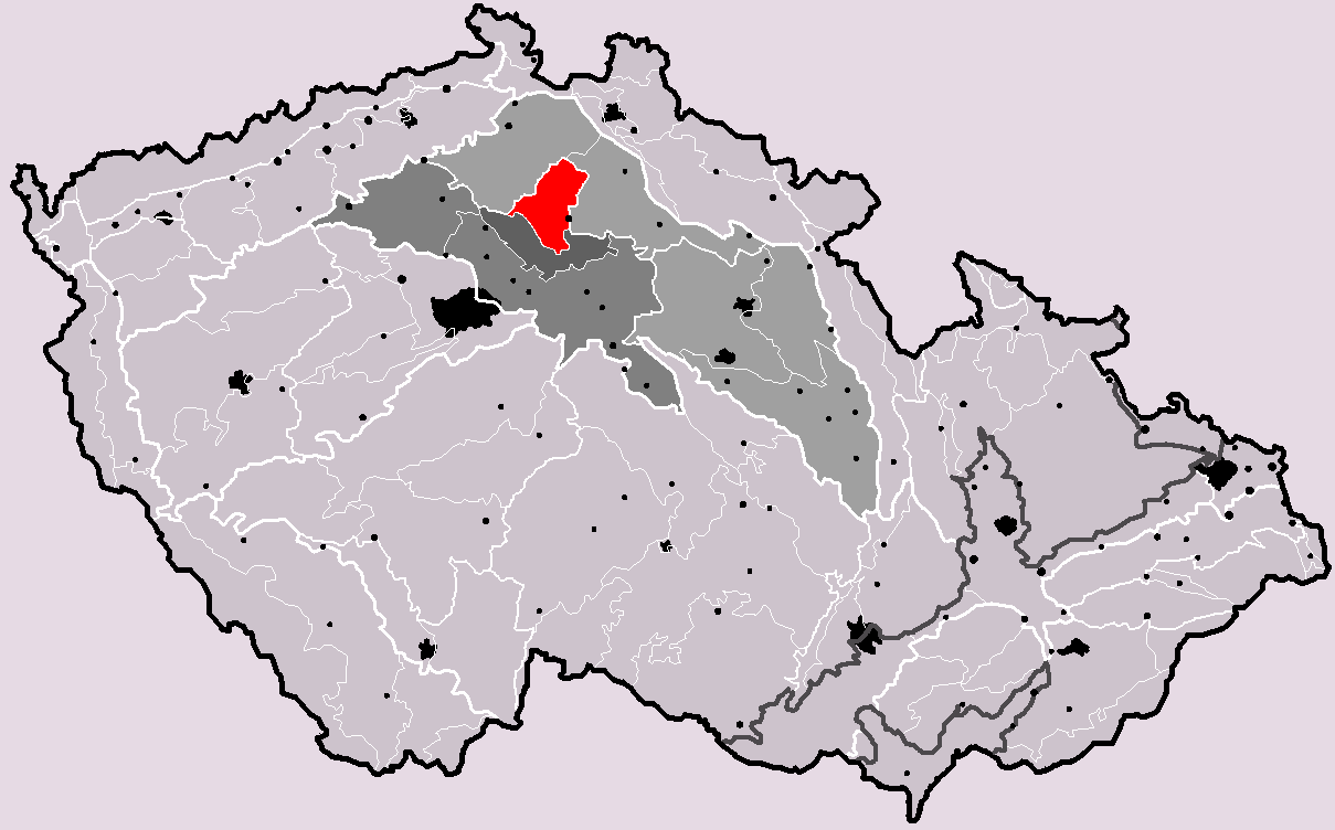 Česky: Poloha geomorfologického podcelku Bělohradská pahorkatina v rámci České republiky. Hercynský systém Hercynská pohoří I Česká vysočina I6 (VI) Česká tabule I6B (VIB) Středočeská tabule I6B-2 (VIB-2) Jizerská tabule (VIB-2A) Středojizerská tabule